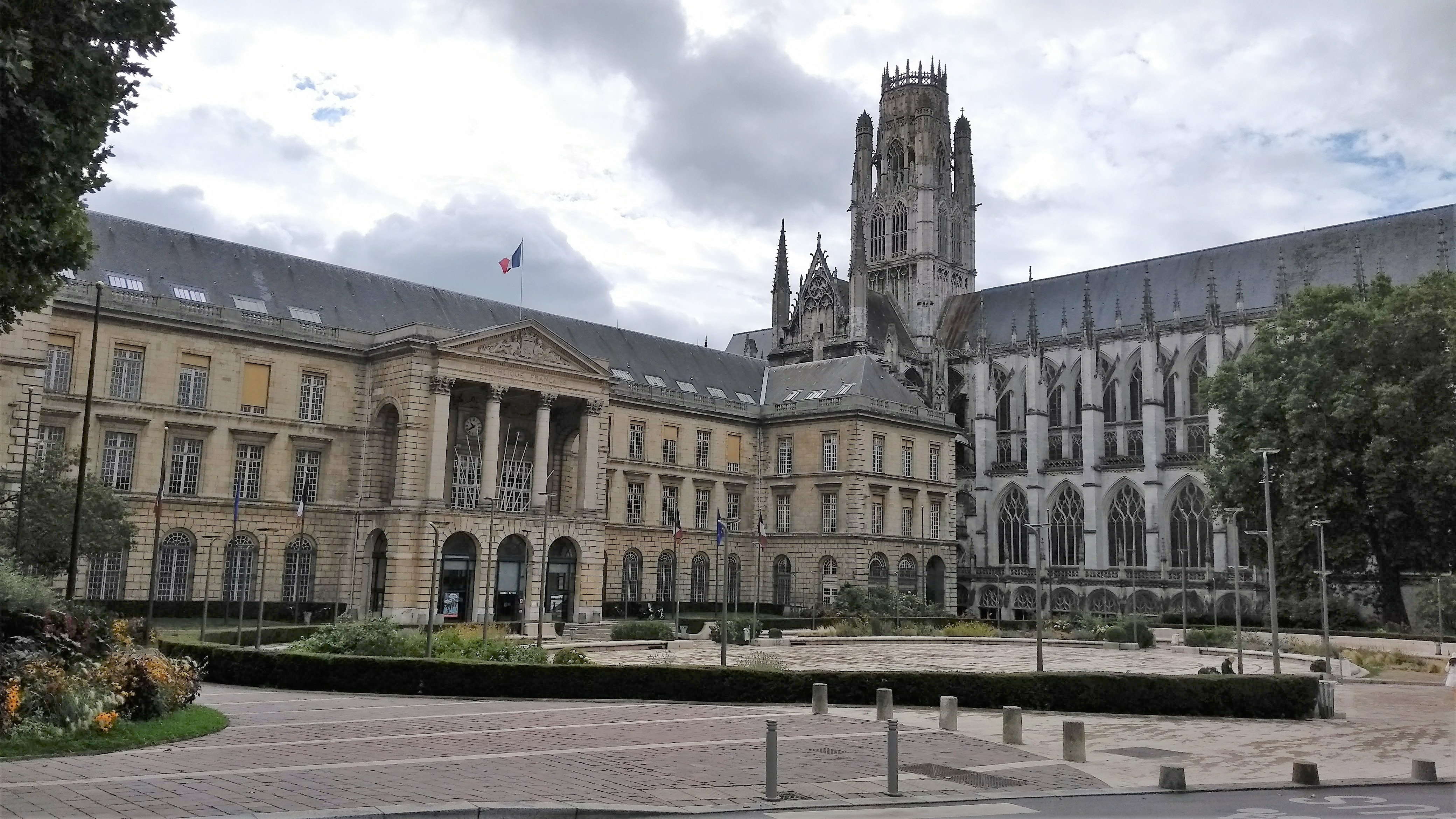 L’hôtel de ville s’installe le 30 mai 1800 dans l’ancienne abbaye Saint-Ouen, désaffectée depuis novembre 1790.